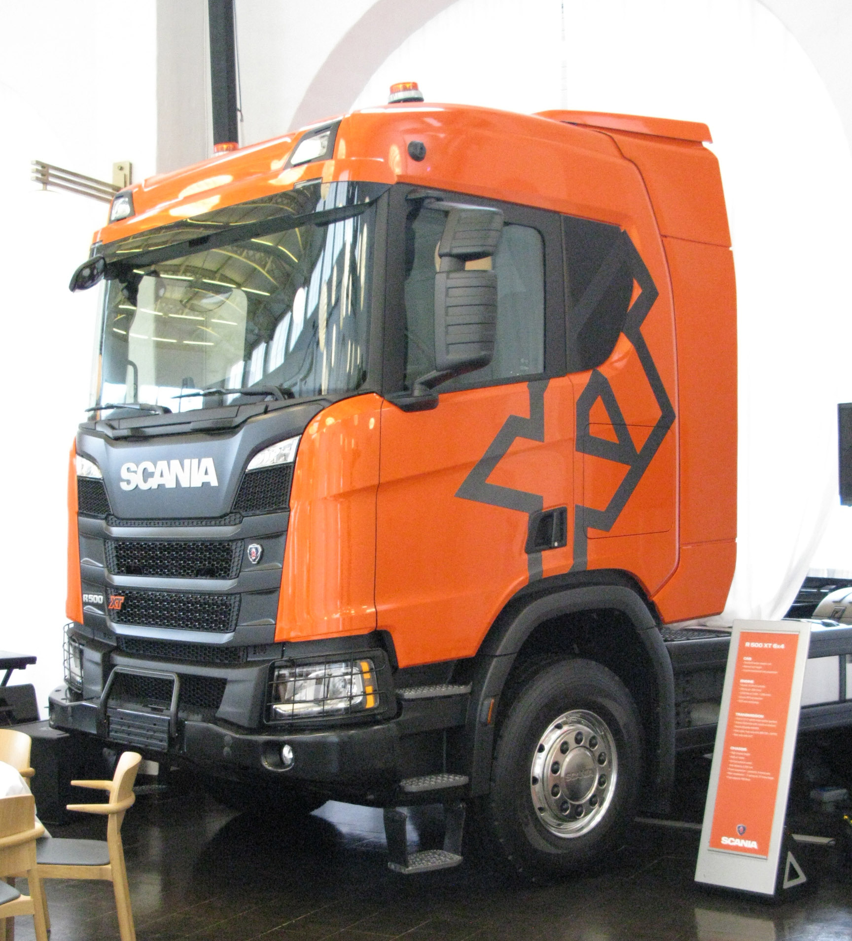 2017 Scania R500 XT 6x4